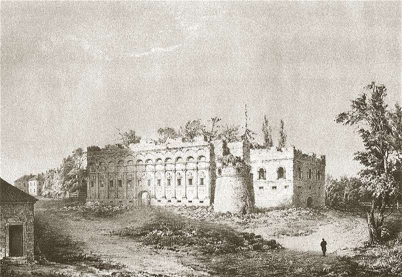 Radvilas Palace in Vilnius, Lithuania